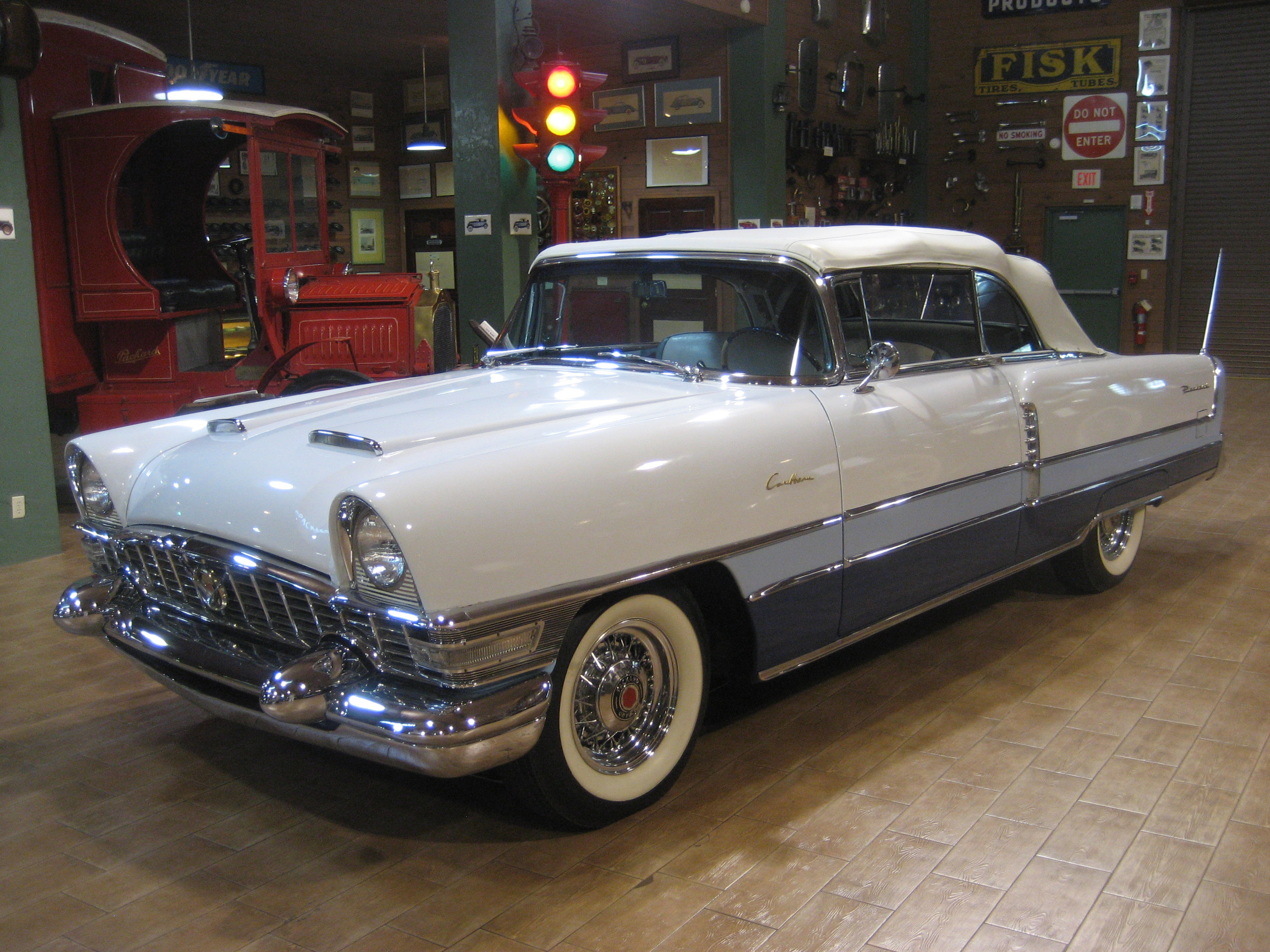 1955 Packard "Caribbean" Convertable, model 5580 On display at Fort Lauderdale Antique Car Museum.